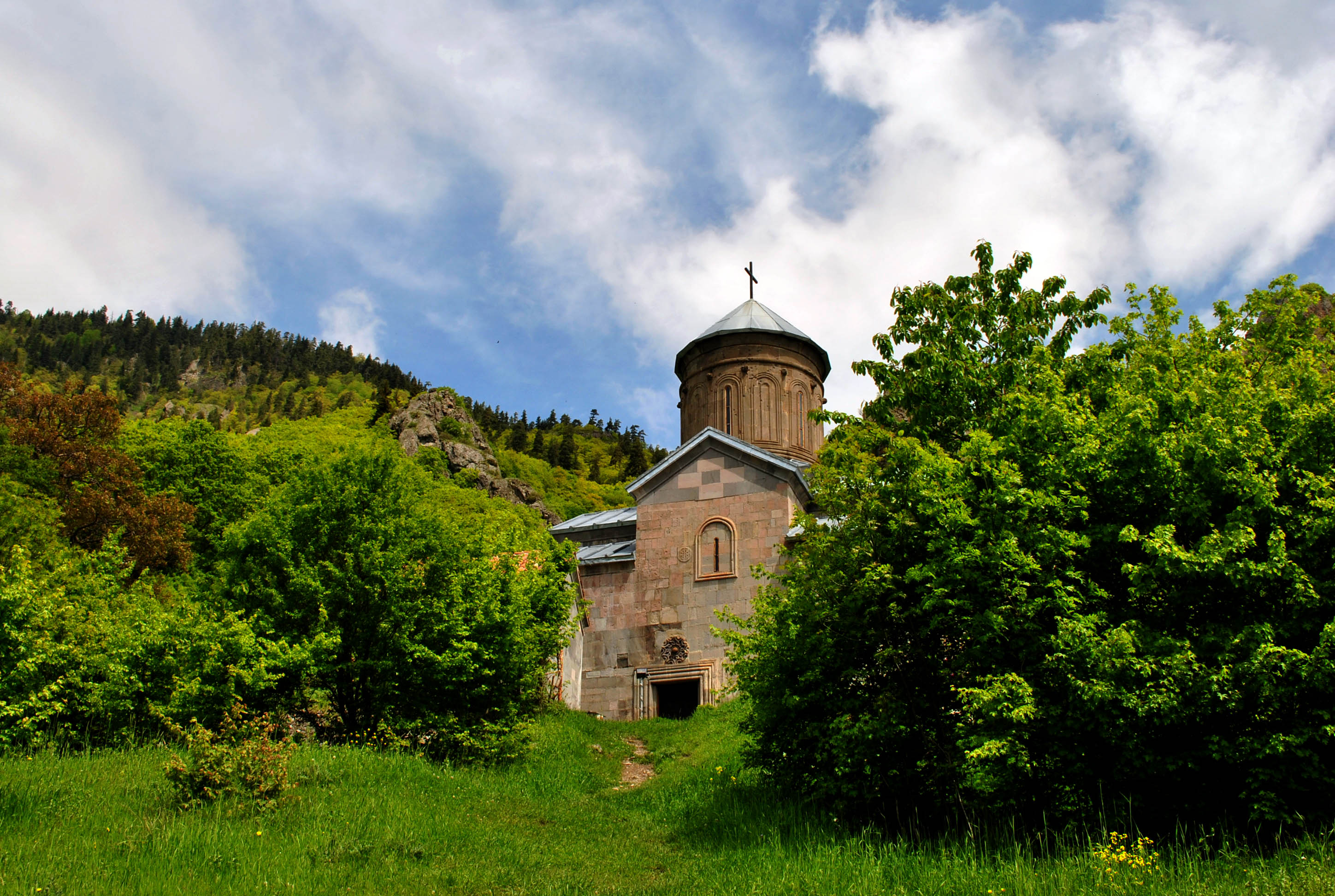 წმ. გიორგის ეკლესია